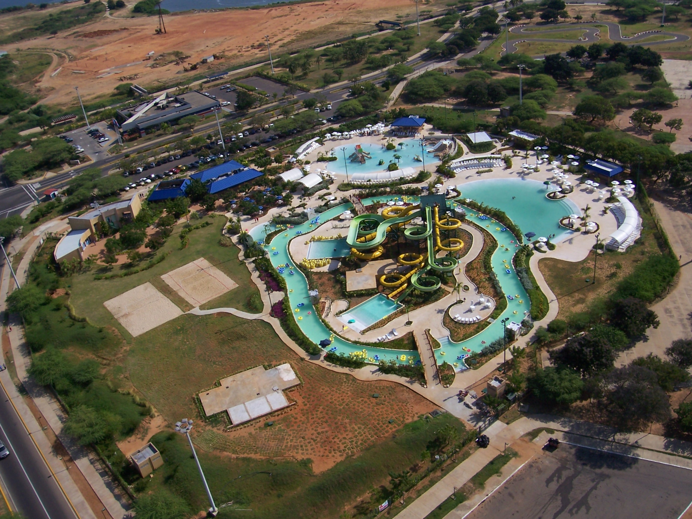 Esta foto foto fue tomada por mi donde muestra a todo el complejo aguamania